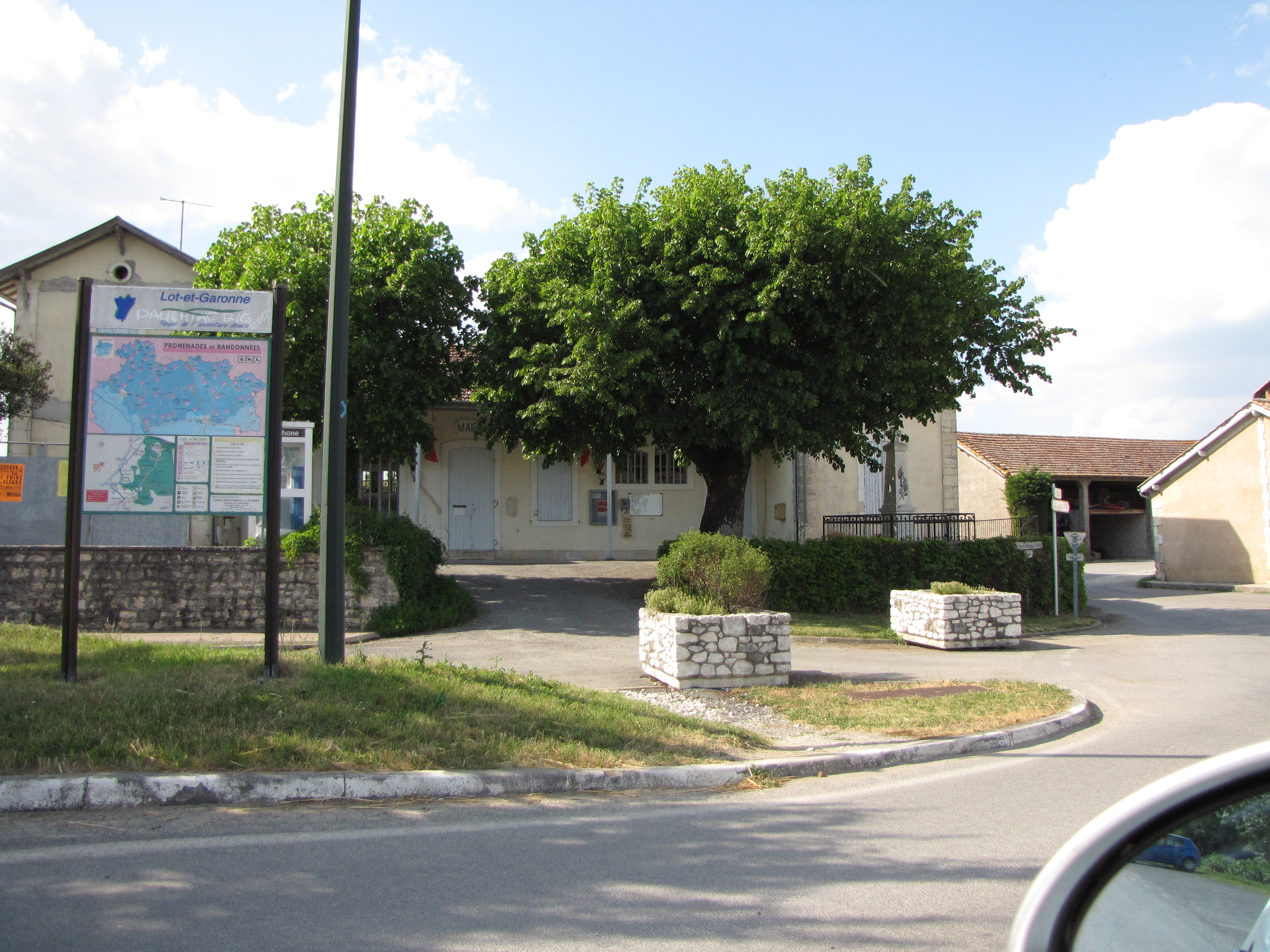 Mairie de Paulhiac